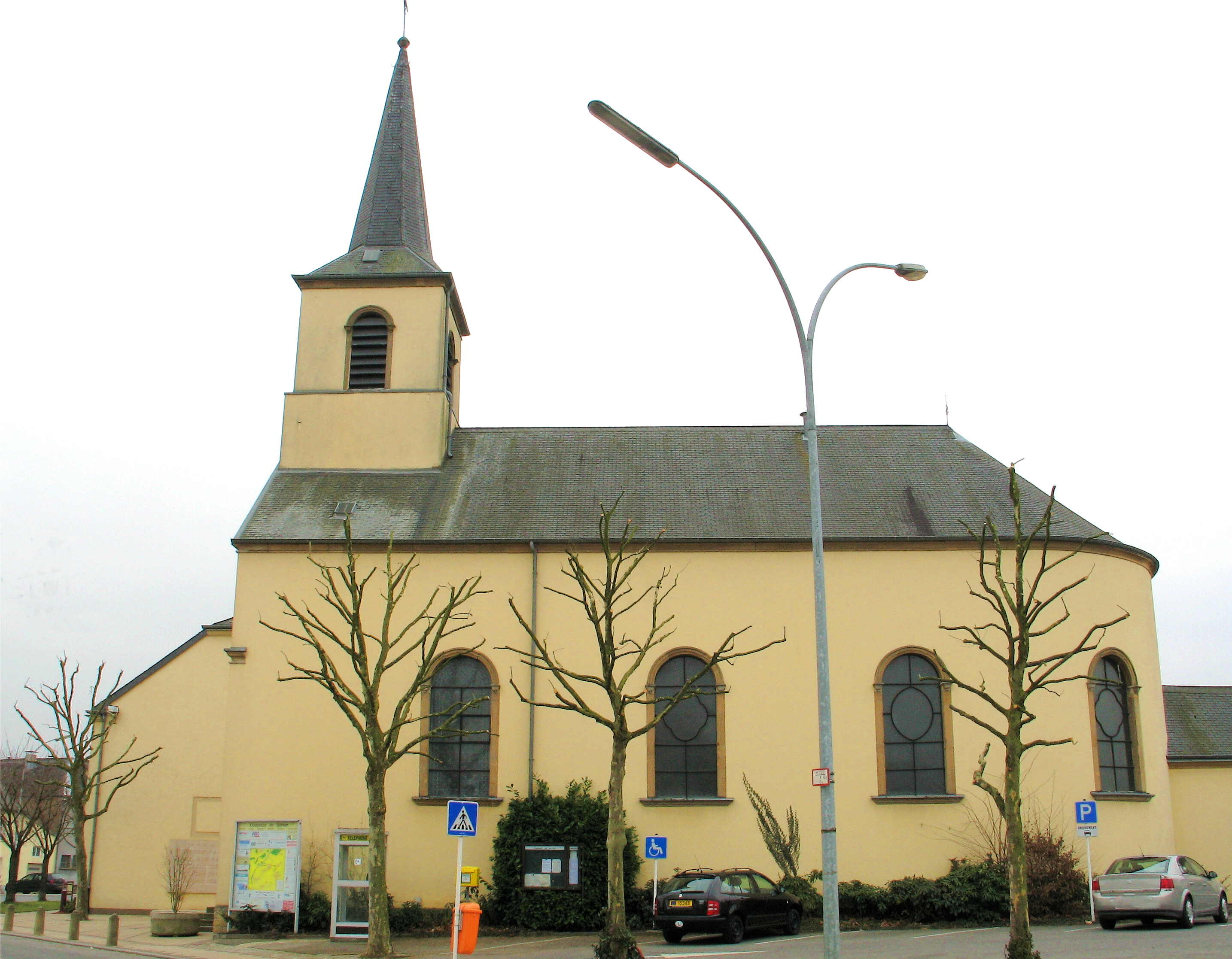 Kierch vu Béiweng